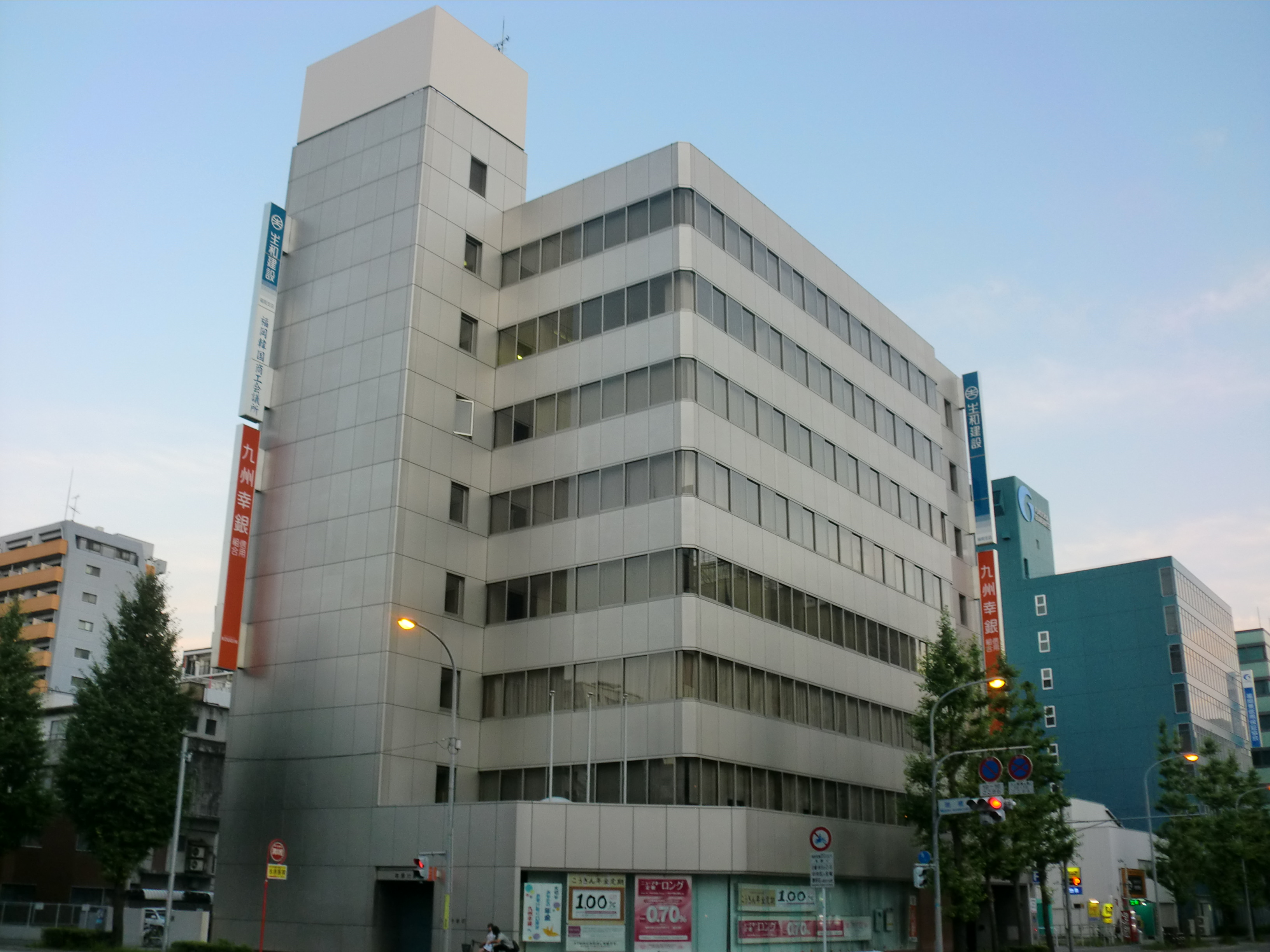 福岡市博多区にある九州幸銀（きゅうしゅうこうぎん）信用組合本店